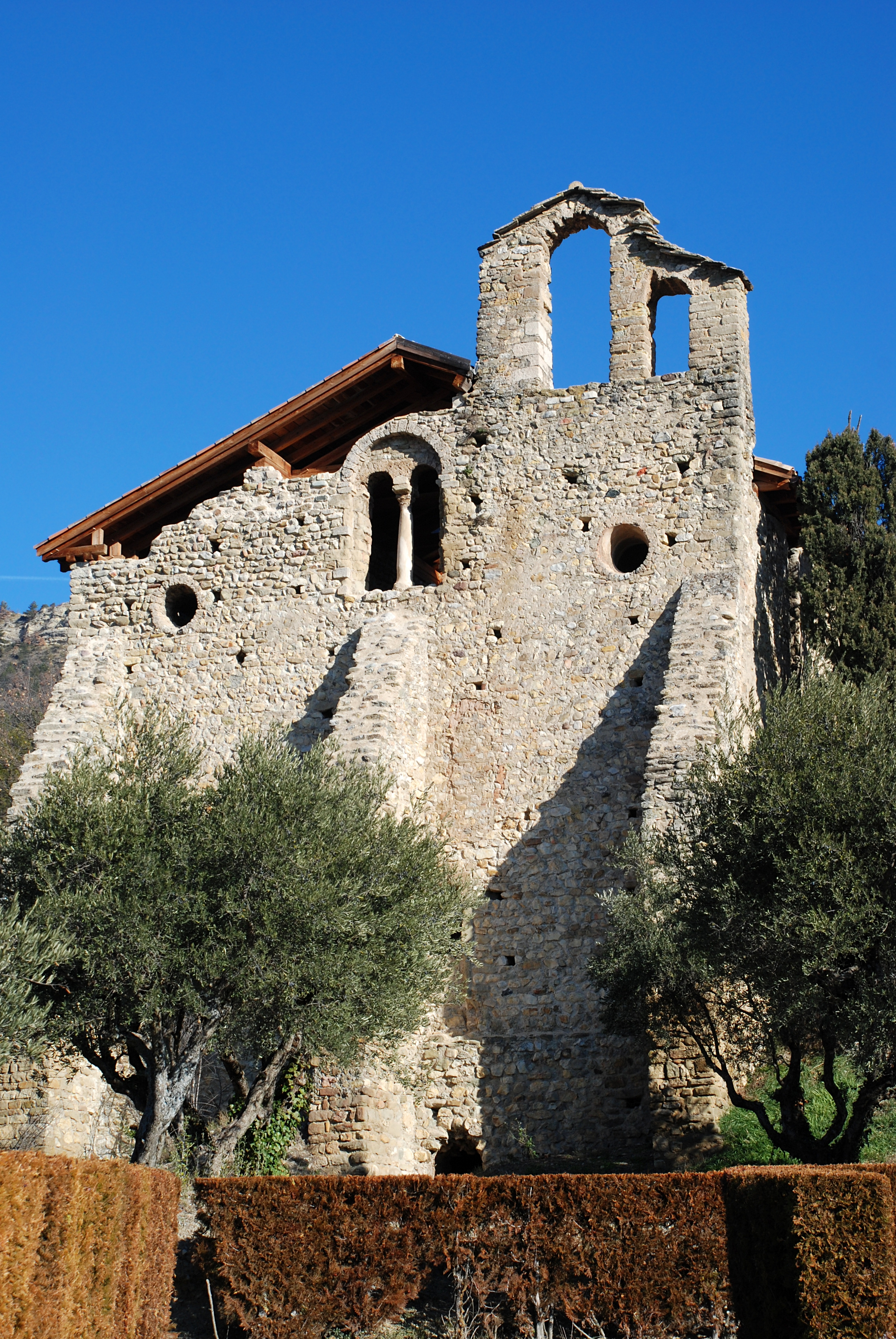 France - Provence - Église Saint-Martin de Volonne